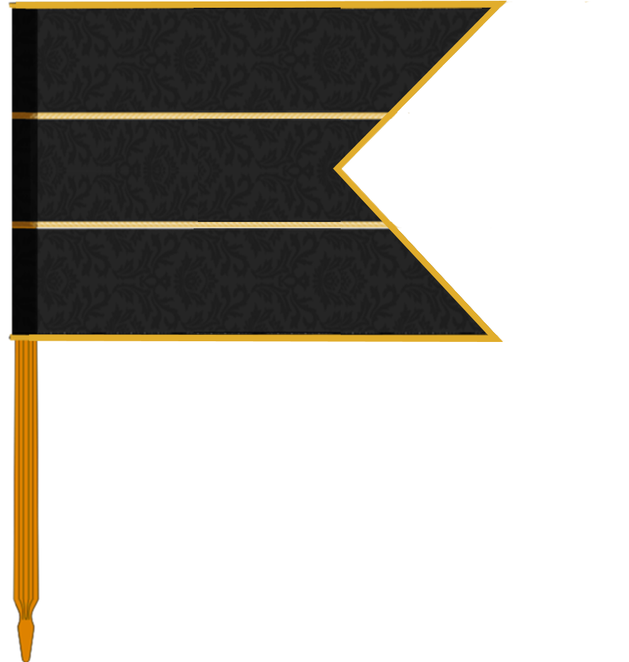 Pendoneta funeraria de Genicera